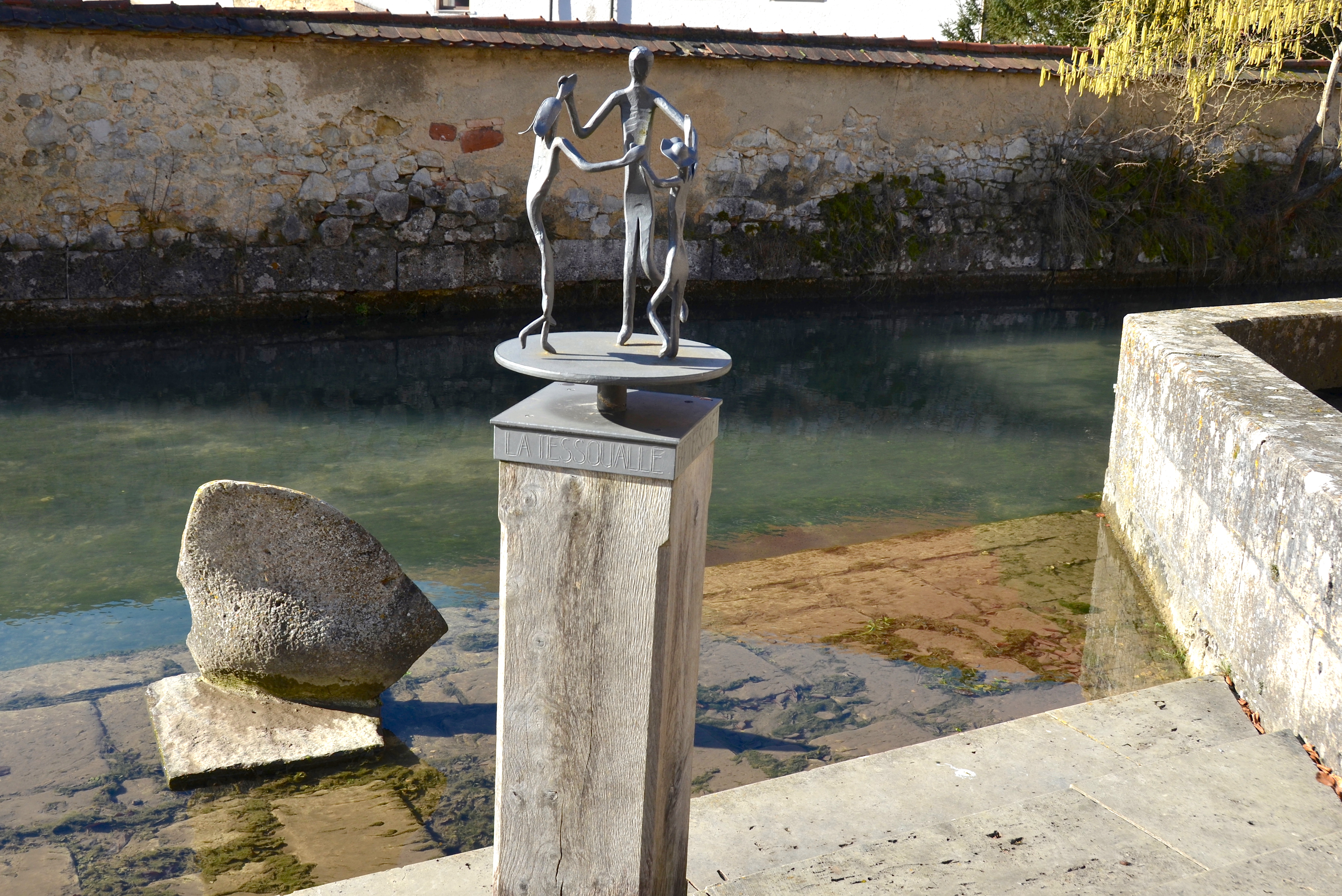 Skulptur (Partnerschaft mit La Tessoualle) an der Zwiefalter Aach beim Münster Unserer Lieben Frau (Zwiefalten)